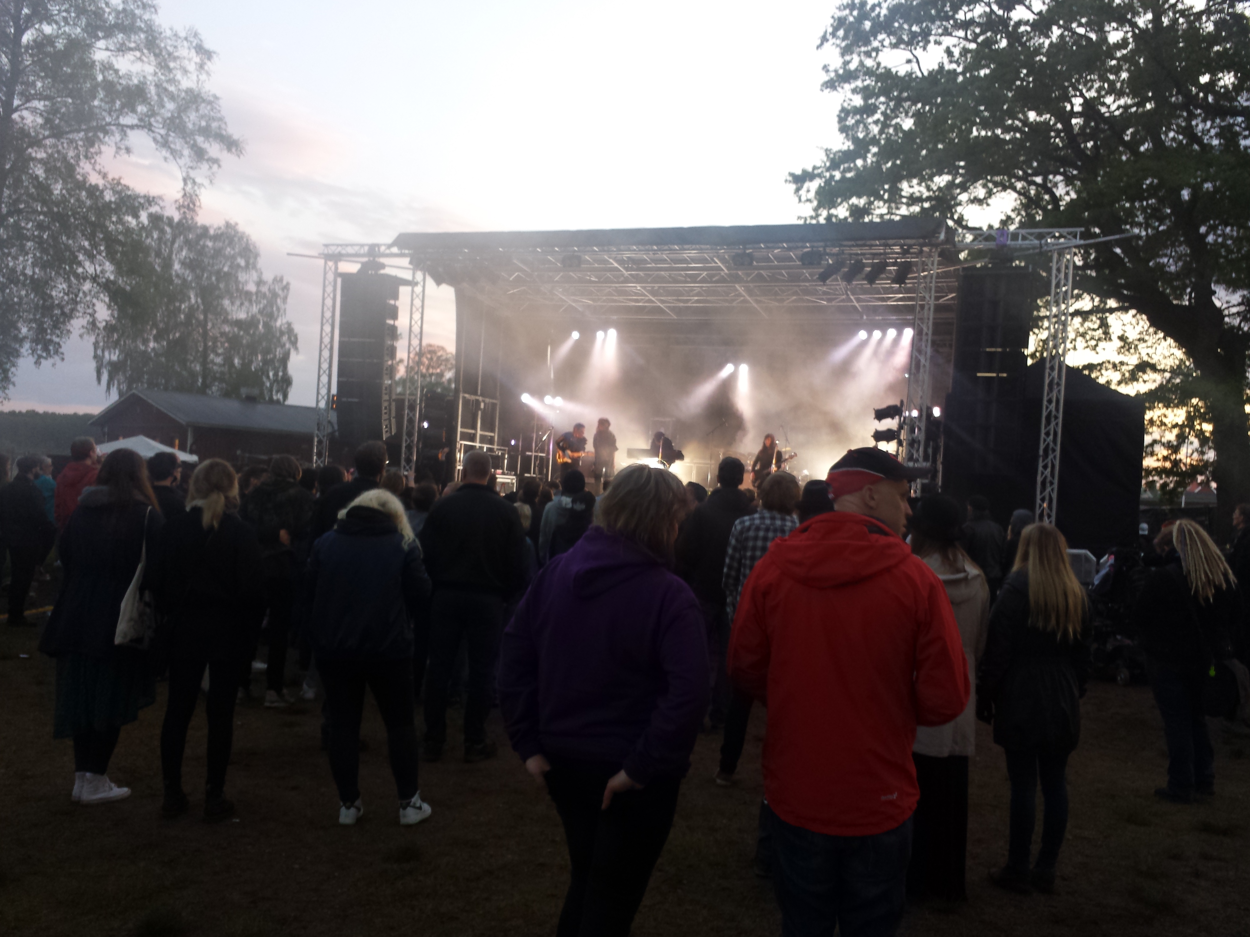 Kvällskonsert på RP-scenen under festivalen This Is Hultsfred 2014.